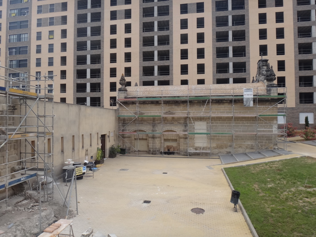 Reparación de la Fuente de la Alcubilla, Jerez de la Frontera (Andalucía, España)